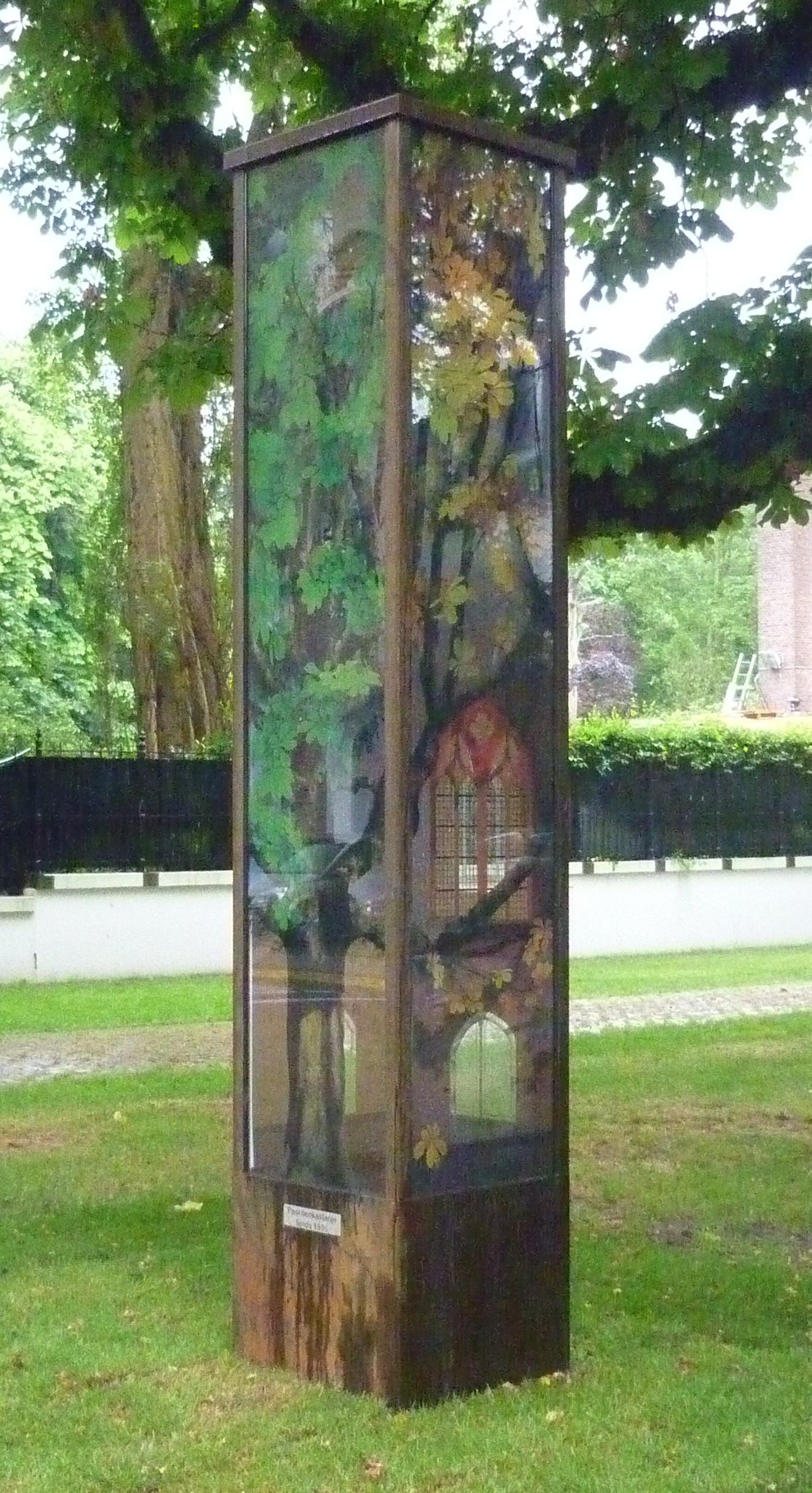 Glazen zuil voor de Willemshof, Nassaulaan Den Haag